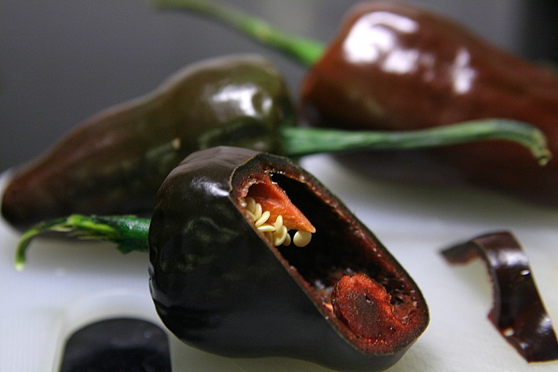 Il chilhuacle negro (nero) è un peperoncino della varietà Capsicum annuum endemico dello stato di d'Oaxaca, in Messico.